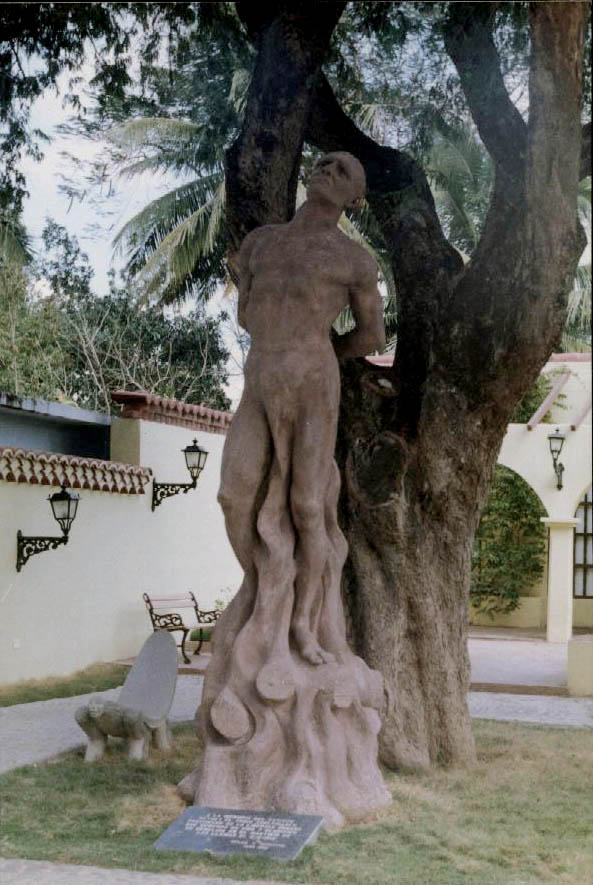 Talla en madera del cacique Hatuey, ubicada en el poblado de Yara, actual provincia de Granma, Cuba.